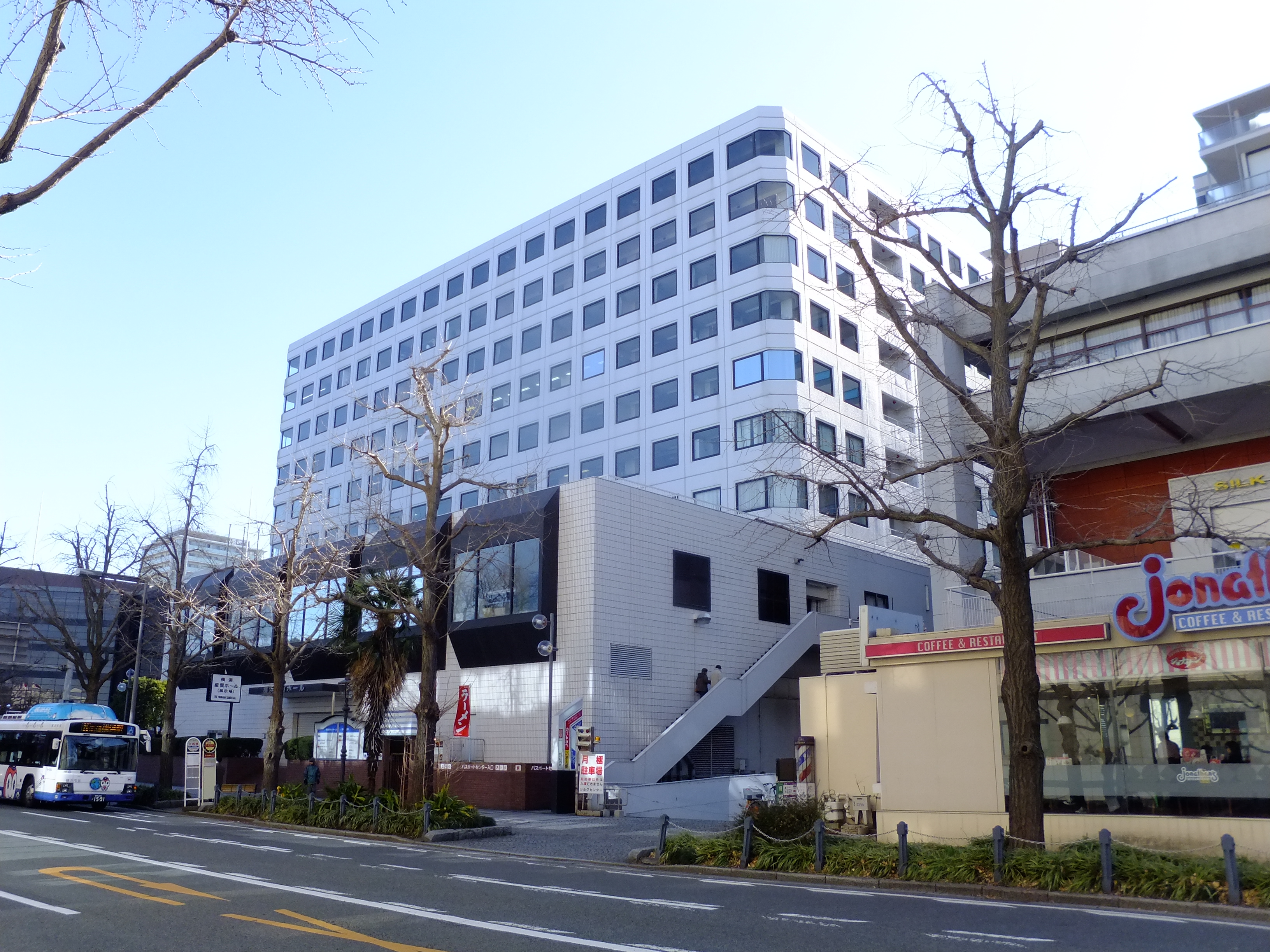 横浜産業貿易センタービル